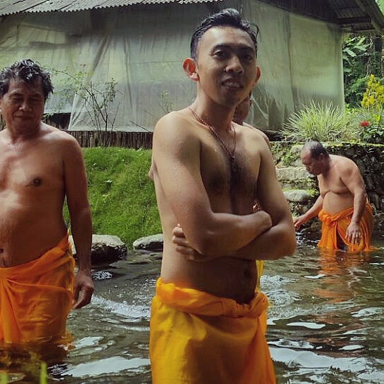 Melukat di Gumuk Kancil Banyuwangi